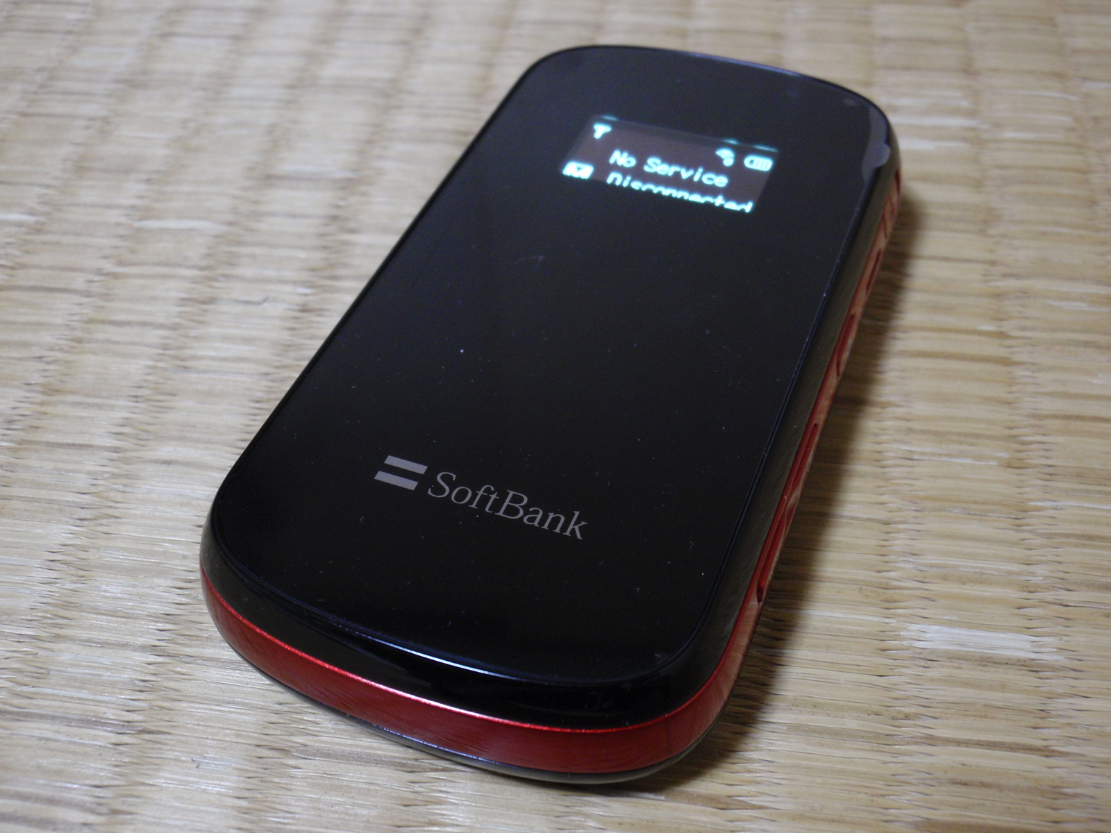 Softbank 007Z モバイルWi-Fiルーター本体